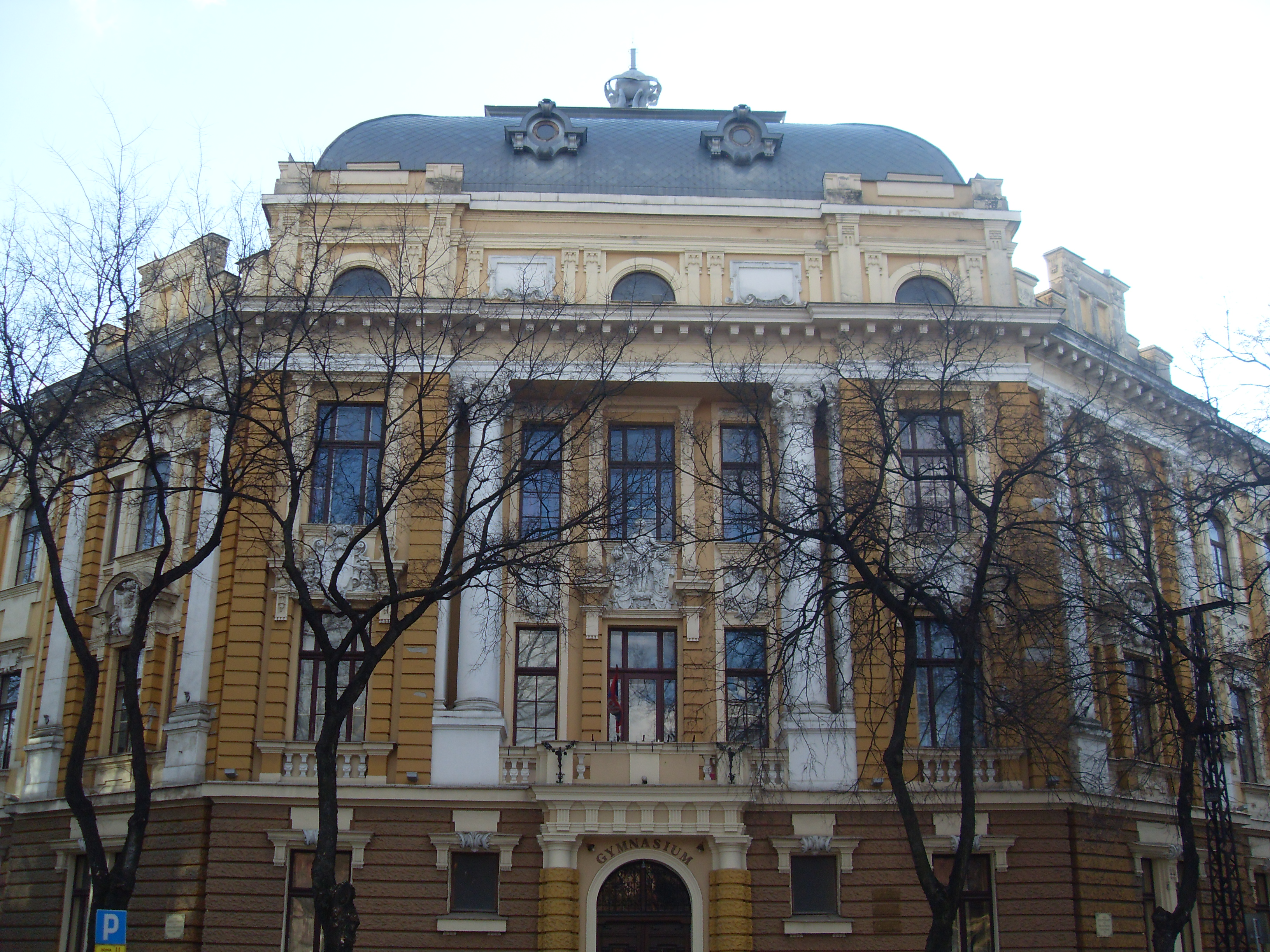 Зграда гимназије „Светозар Марковић“ , Суботица